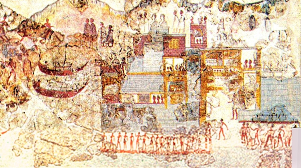 Schiffsfresko aus Raum 5 im Obergeschoss des Westhauses der Ausgrabungsstätte in Akrotiri auf Santorin, Kykladen, Griechenland